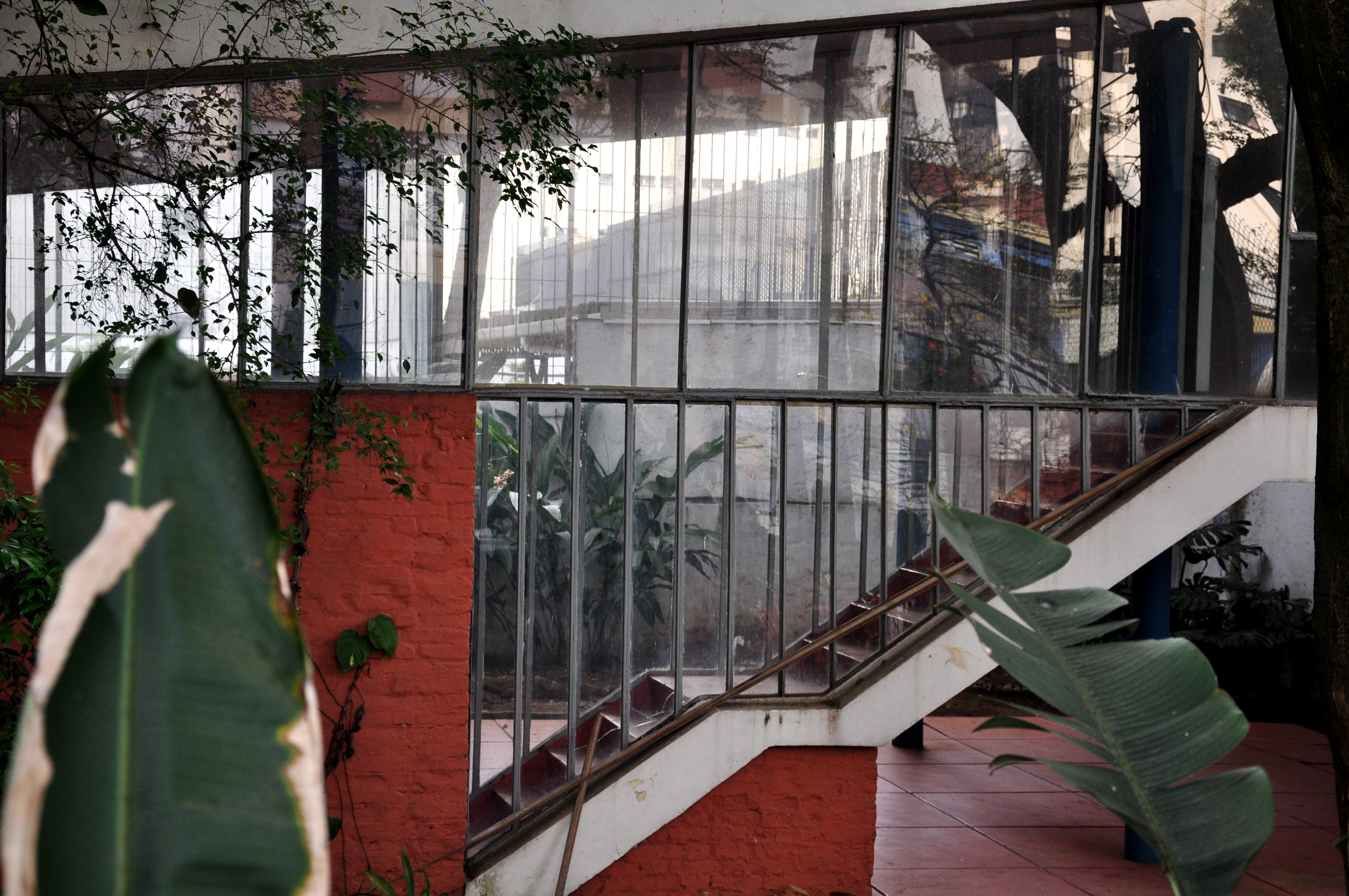 Visão frontal de parte da fachada de uma das construções da Residência Vilanova Artigas II, em São Paulo (SP), Brasil.